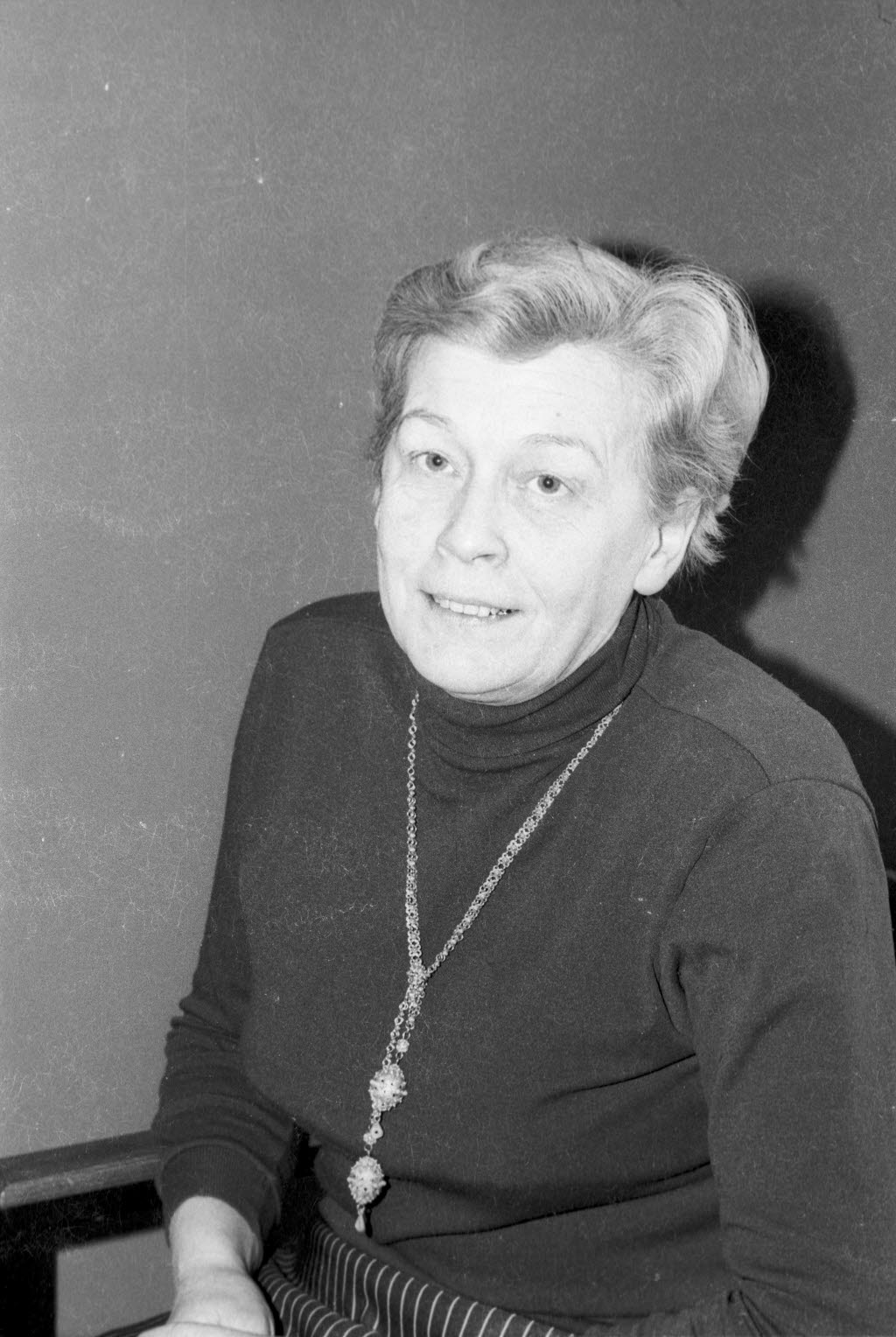 Bundestagsabgeordnete (MdB) Elisabeth Orth (SPD)